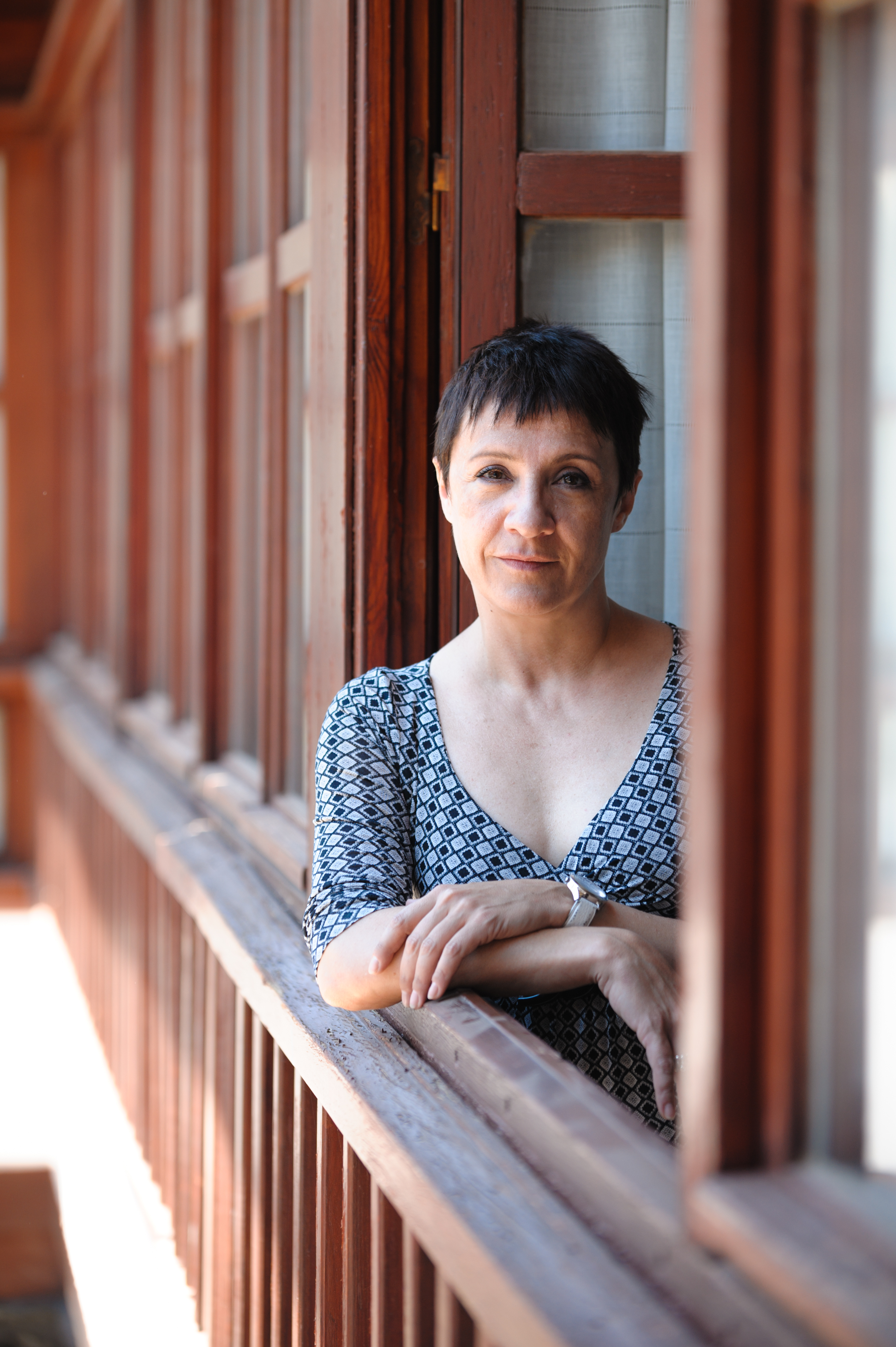 Blanca Portillo antes de la rueda de prensa de presentación de La vida es sueño Festival Internacional de Teatro Clásico de Almagro. Foto: Guillermo Casas